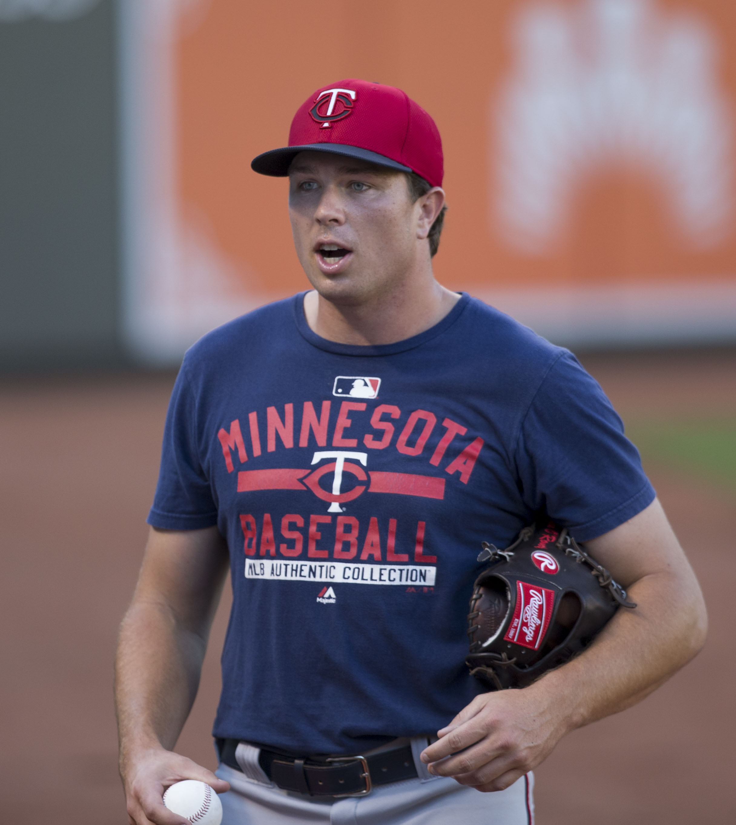 Ryan O'Rourke